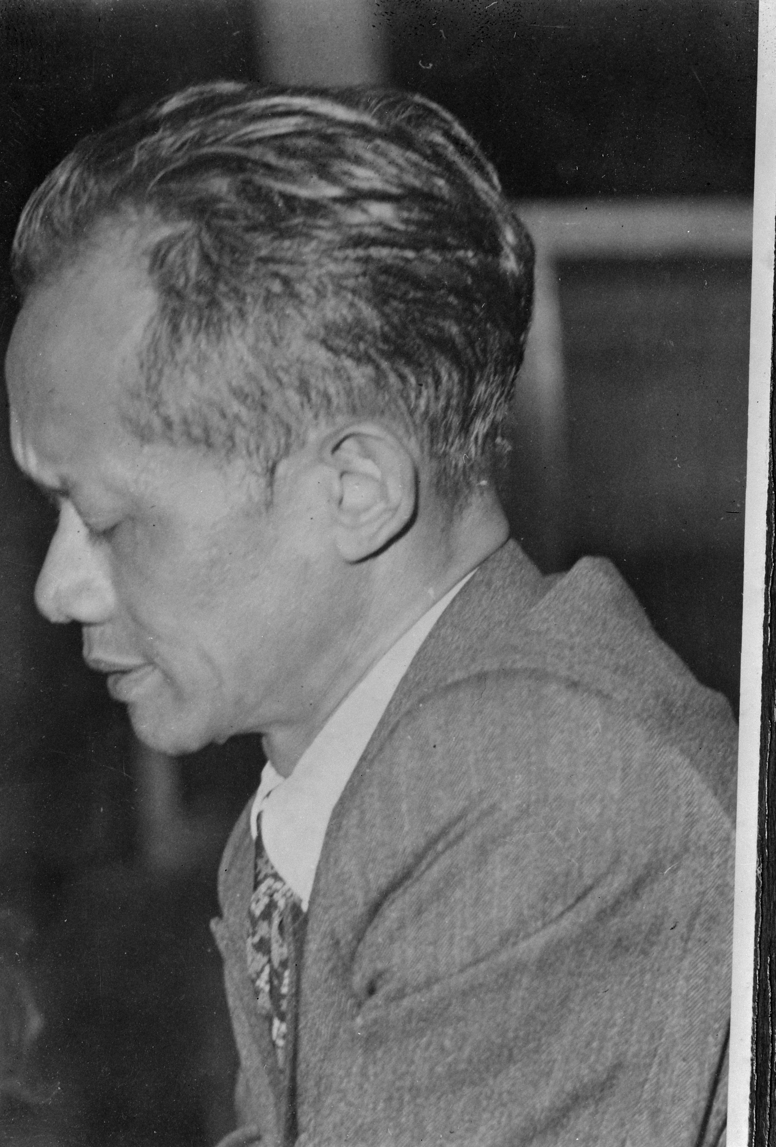 Collectie / Archief : Fotocollectie Dienst voor Legercontacten Indonesië Reportage / Serie : [DLC] Republikeinse autoriteiten Beschrijving : Soewandi, minister van Onderwijs (Pendidikan) in het kabinet Sjahrir III Datum : 1947 Locatie : Indonesië, Nederlands-Indië Fotograaf : Fotograaf Onbekend / DLC Auteursrechthebbende : Nationaal Archief Materiaalsoort : Negatief (zwart/wit) Nummer archiefinventaris : bekijk toegang 2.24.04.03 Bestanddeelnummer : 11867